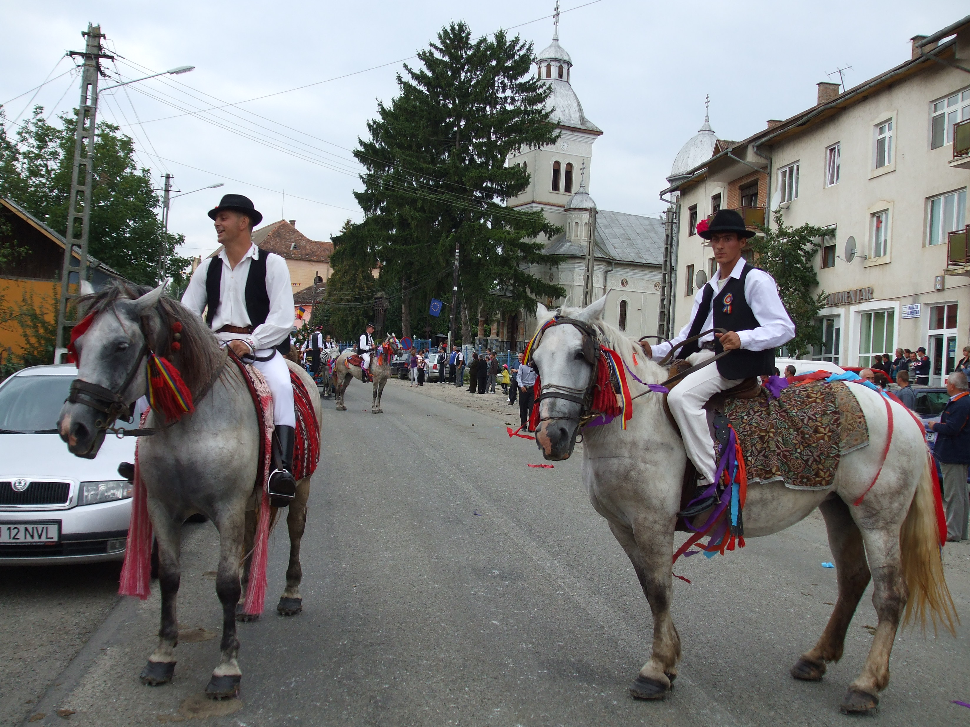 Mociu - zona centrală